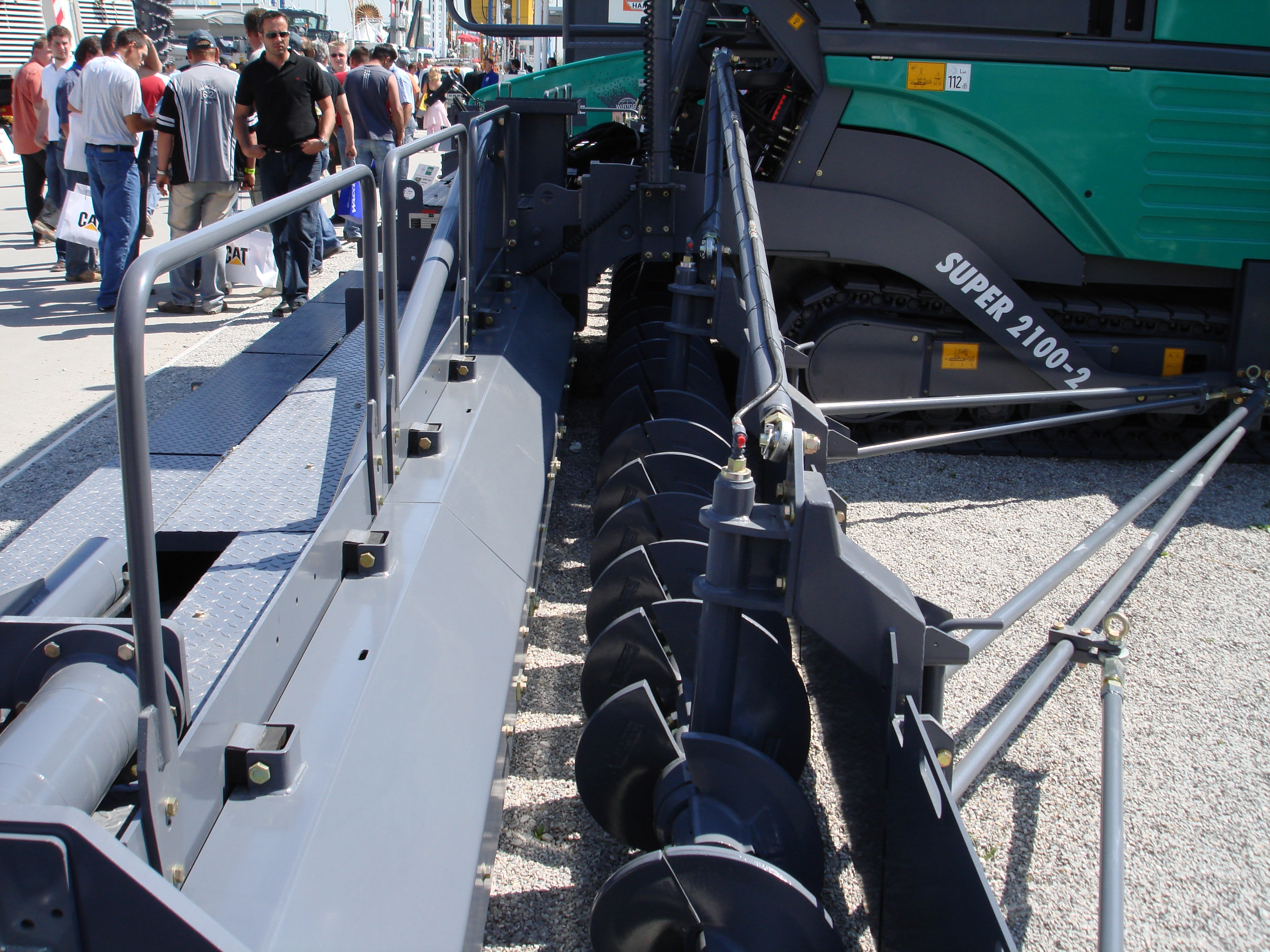 Super 2100-2 von Vögele angebaut auf 13 m auf der Bauma 2007. Es sind Kanalleitbleche und Schneckenverlängerungen montiert.